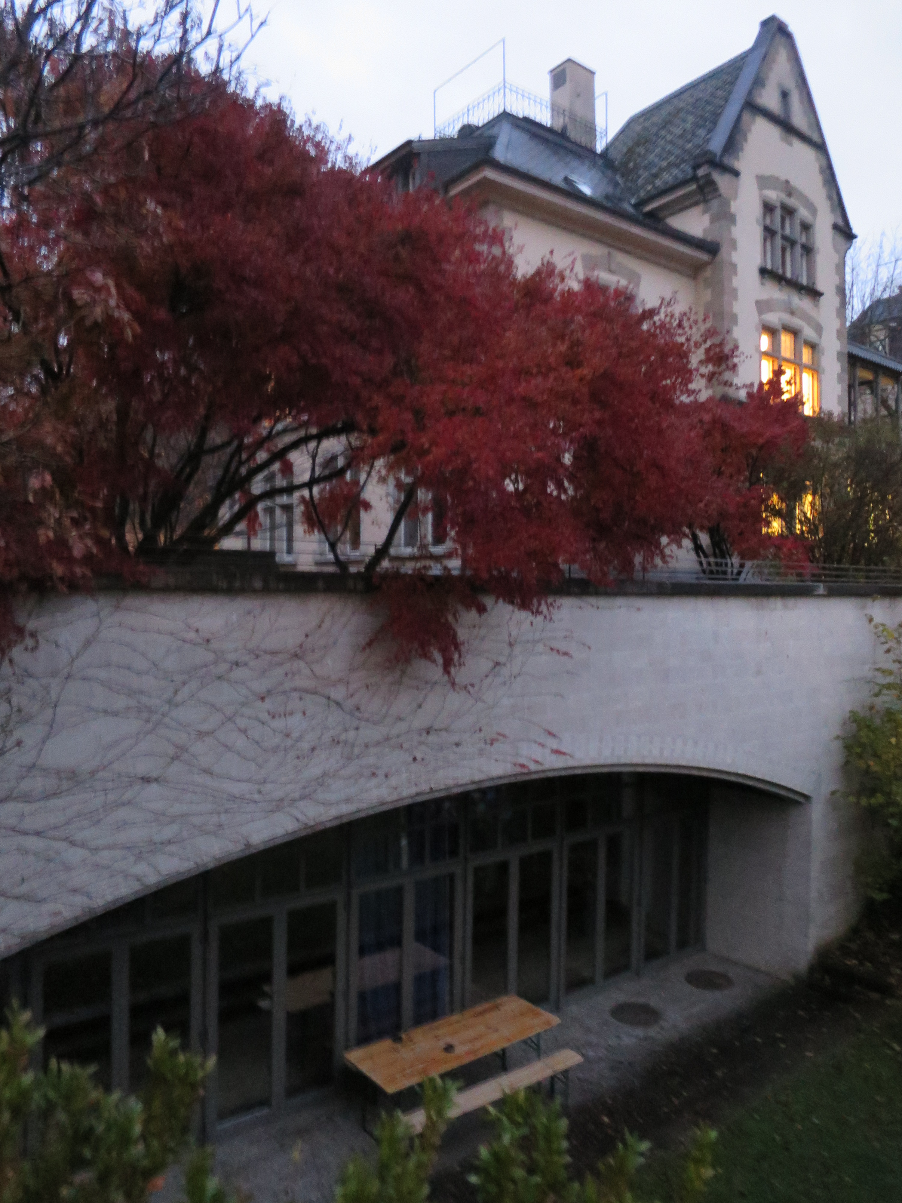 Ref. Kirche Unterstrass - Gemeindezentrum mit Pfarrhaus